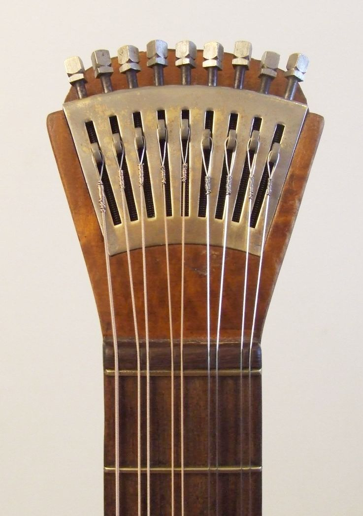 Mechanik der Hamburger Waldzither (eine Cister), basierend auf der "Preston's machine" der English guitar. Foto von User:Neitram, Februar 2007.